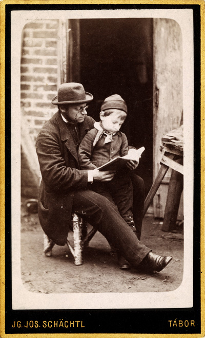 Ignác Šechtl se synem Josefem Jindřichem.